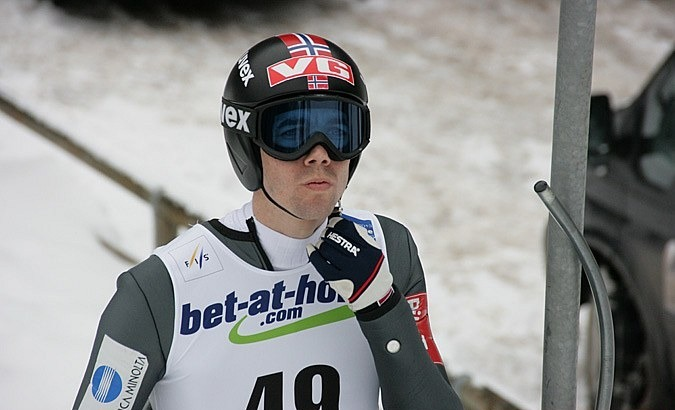 Anders Bardal podczas konkursu indywidualnego mężczyzn na skoczni normalnej w ramach Mistrzostw Świata 2013.